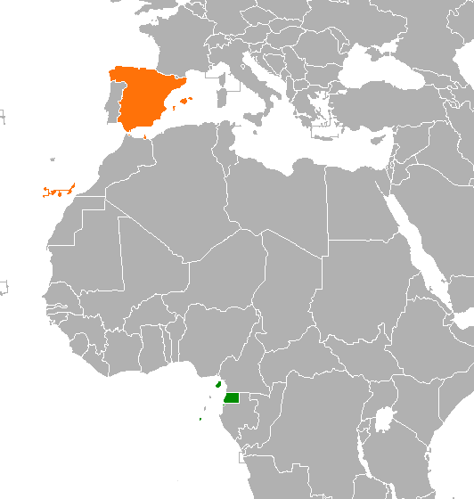 Localización de España y Guinea Ecuatorial